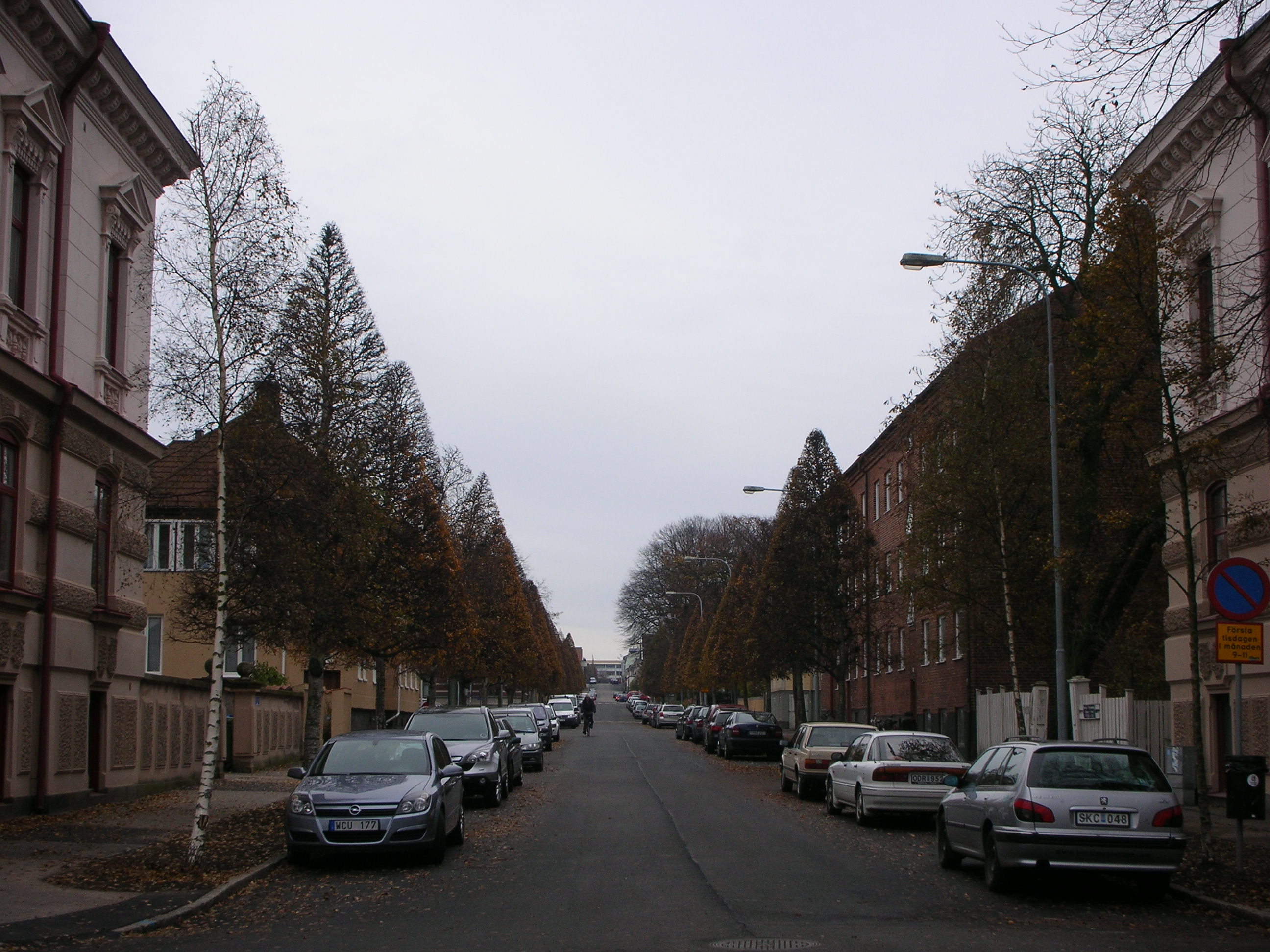 Eskilsgatan sedd österut.